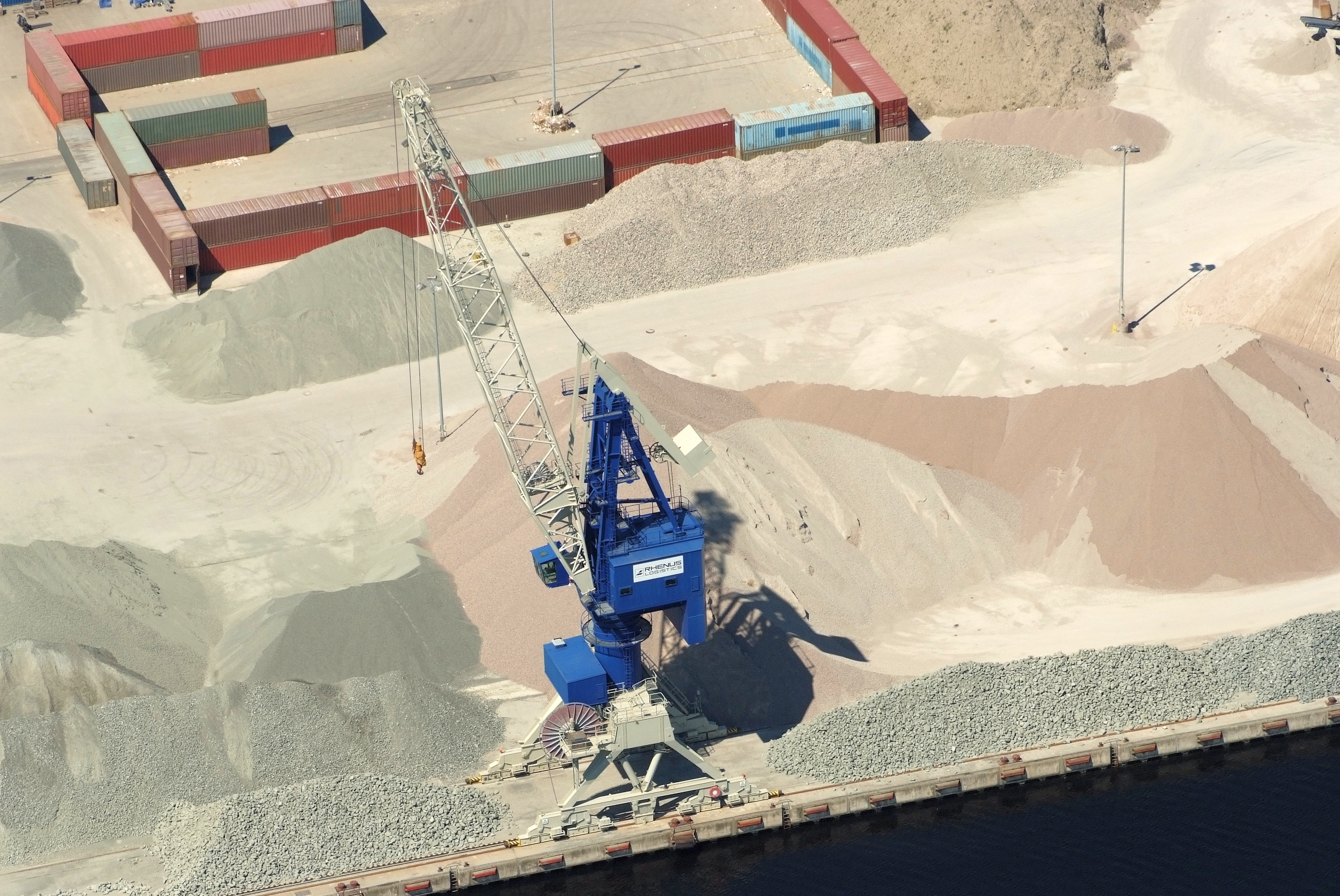 Fotoflug vom Flugplatz Nordholz-Spieka über Cuxhaven und Wilhelmshaven